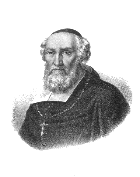 Mikołaj Dzierzgowski, primate of Poland (died 1559, picture 1864)